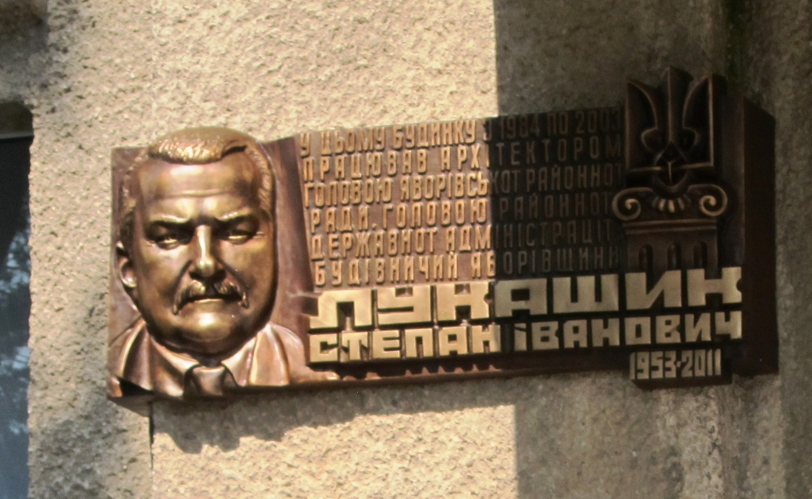 Фасад адміністрації в Яворові